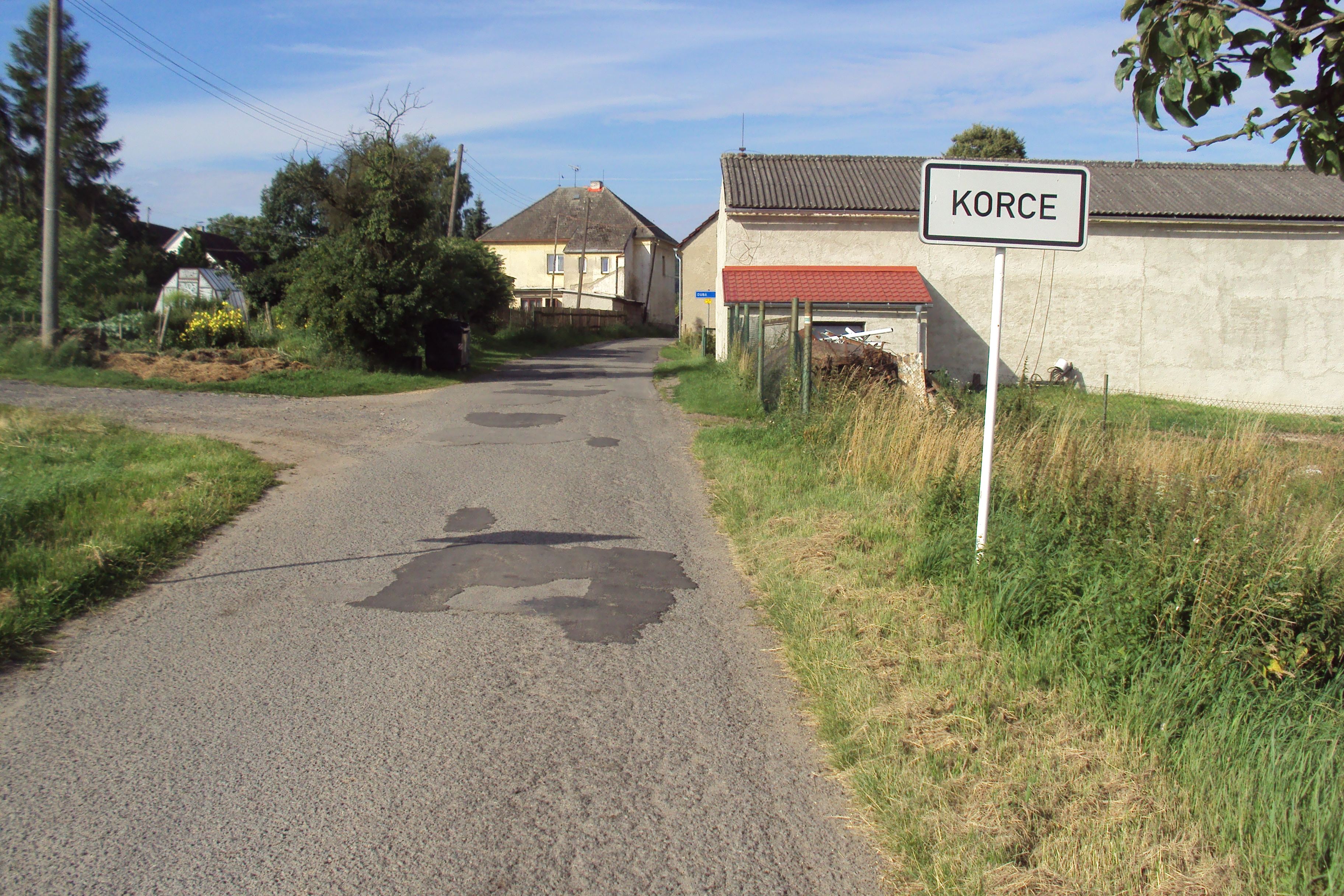 Začátek obce Korce na Českolipsku z silnice od Doksy